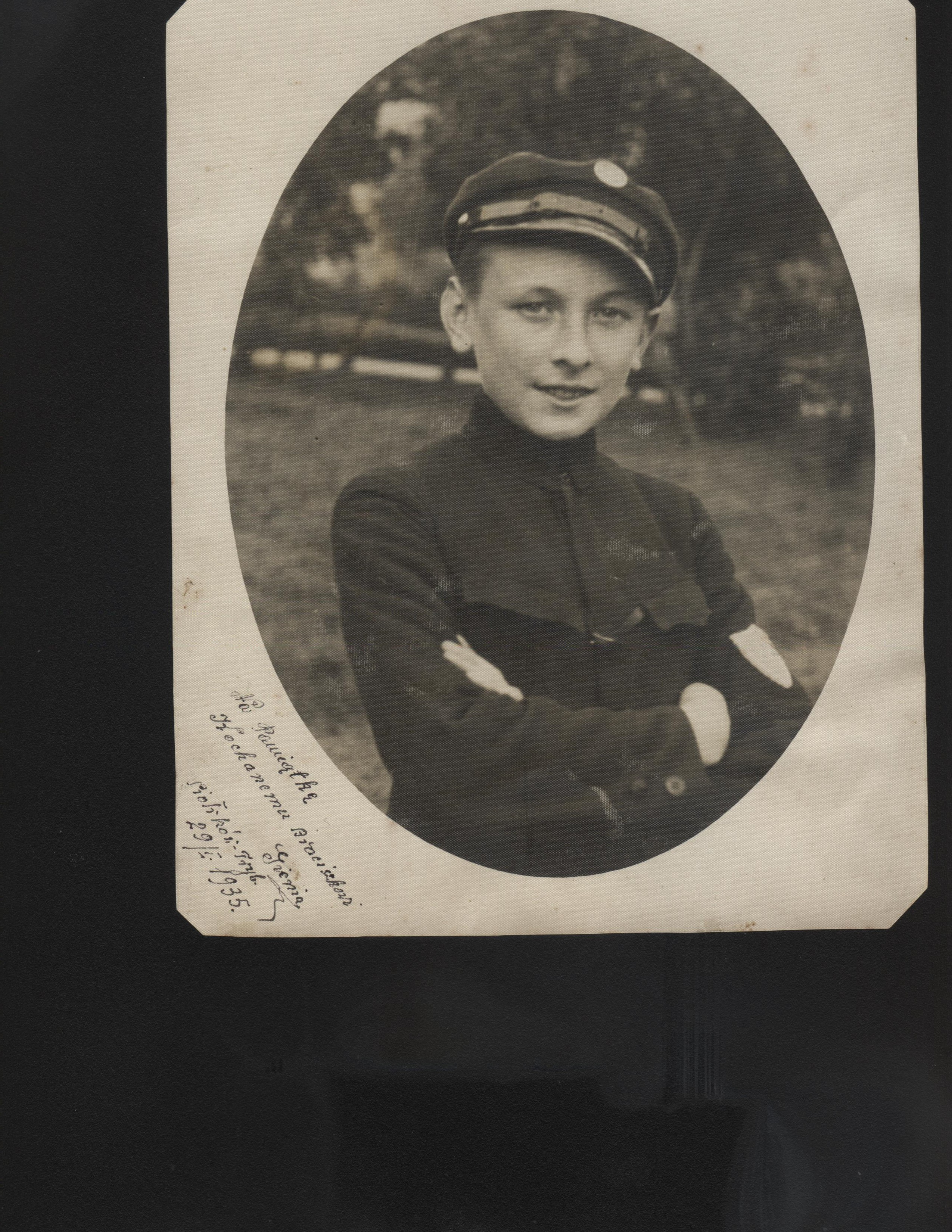 Z domowego archiwum Ewy Łukasik